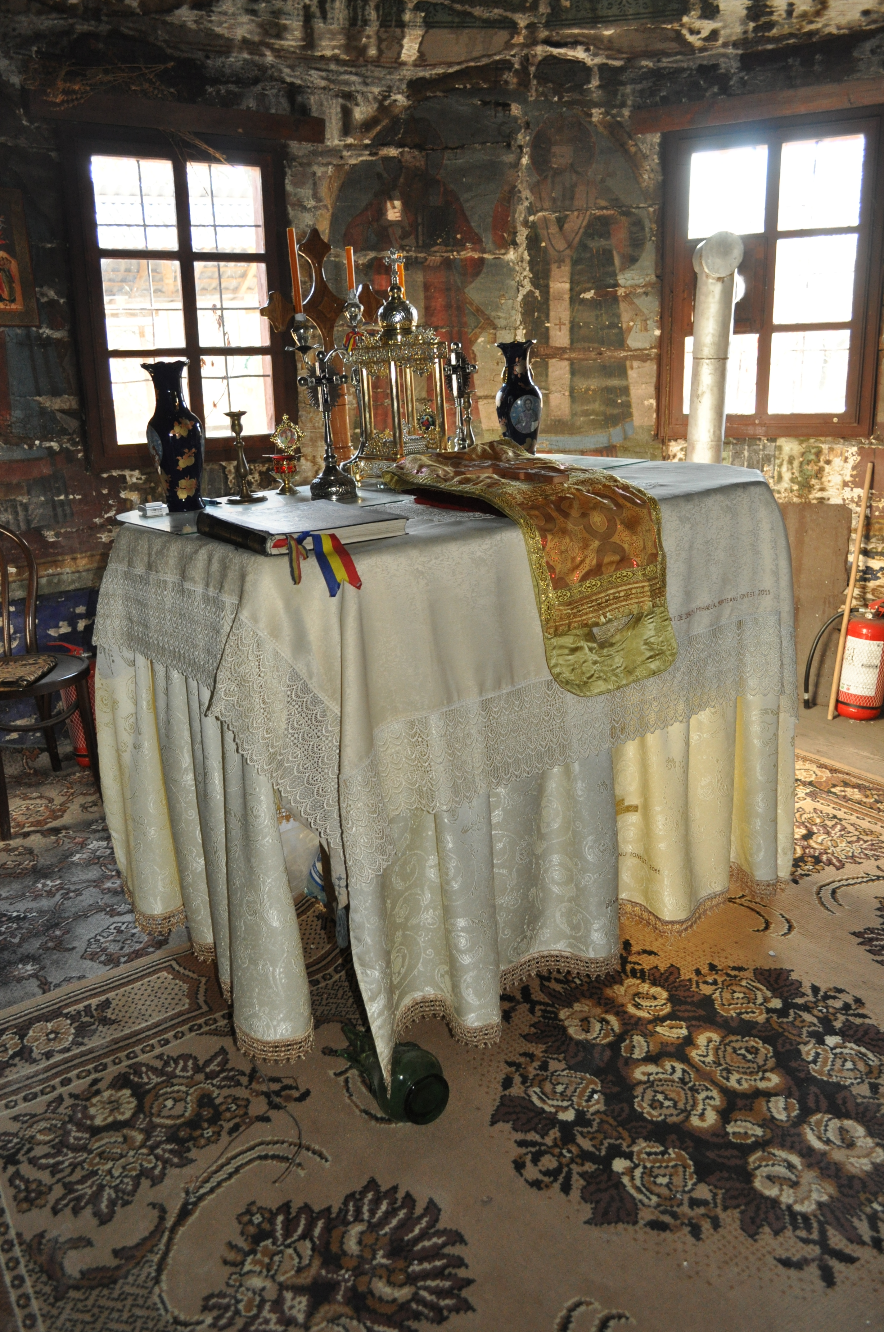 Biserica de lemn „Sfântul Mare Mucenic Gheorghe” din Ionești, județul Arad